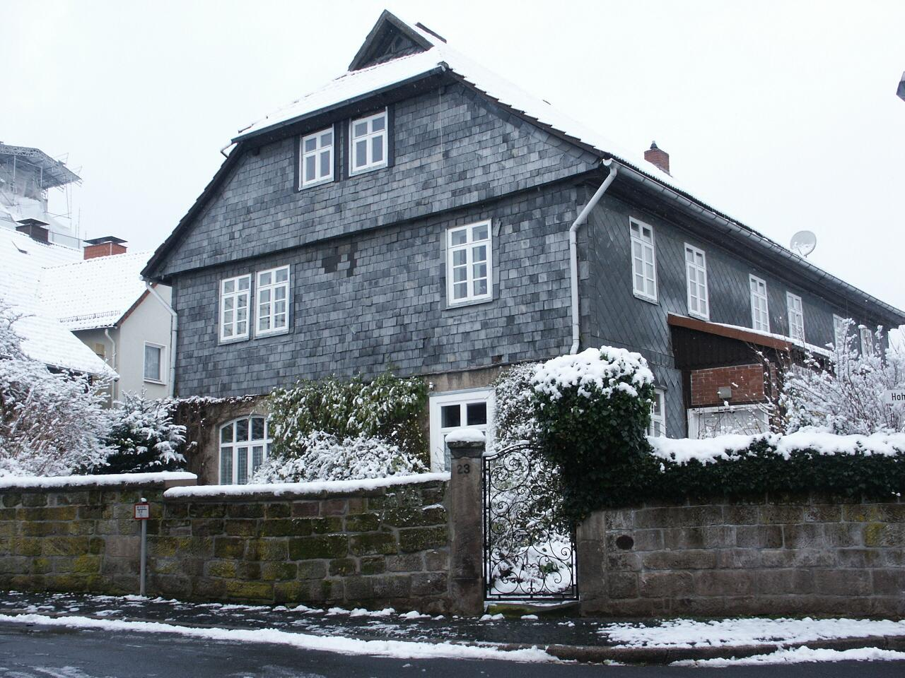 Erster Burgmannshof der Stadt Hardegsen (Deutschland)